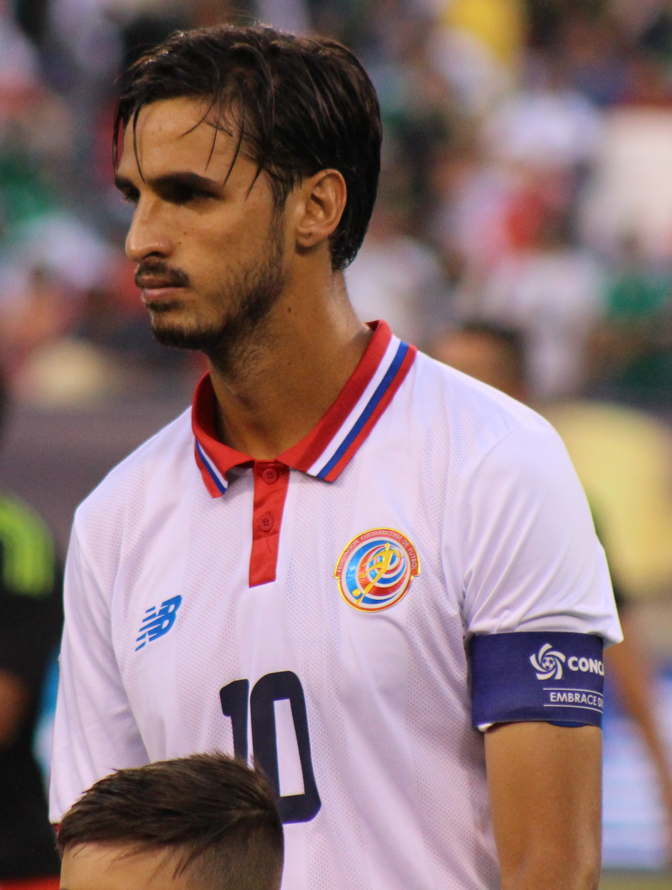 El delantero costarricense Bryan Ruiz.